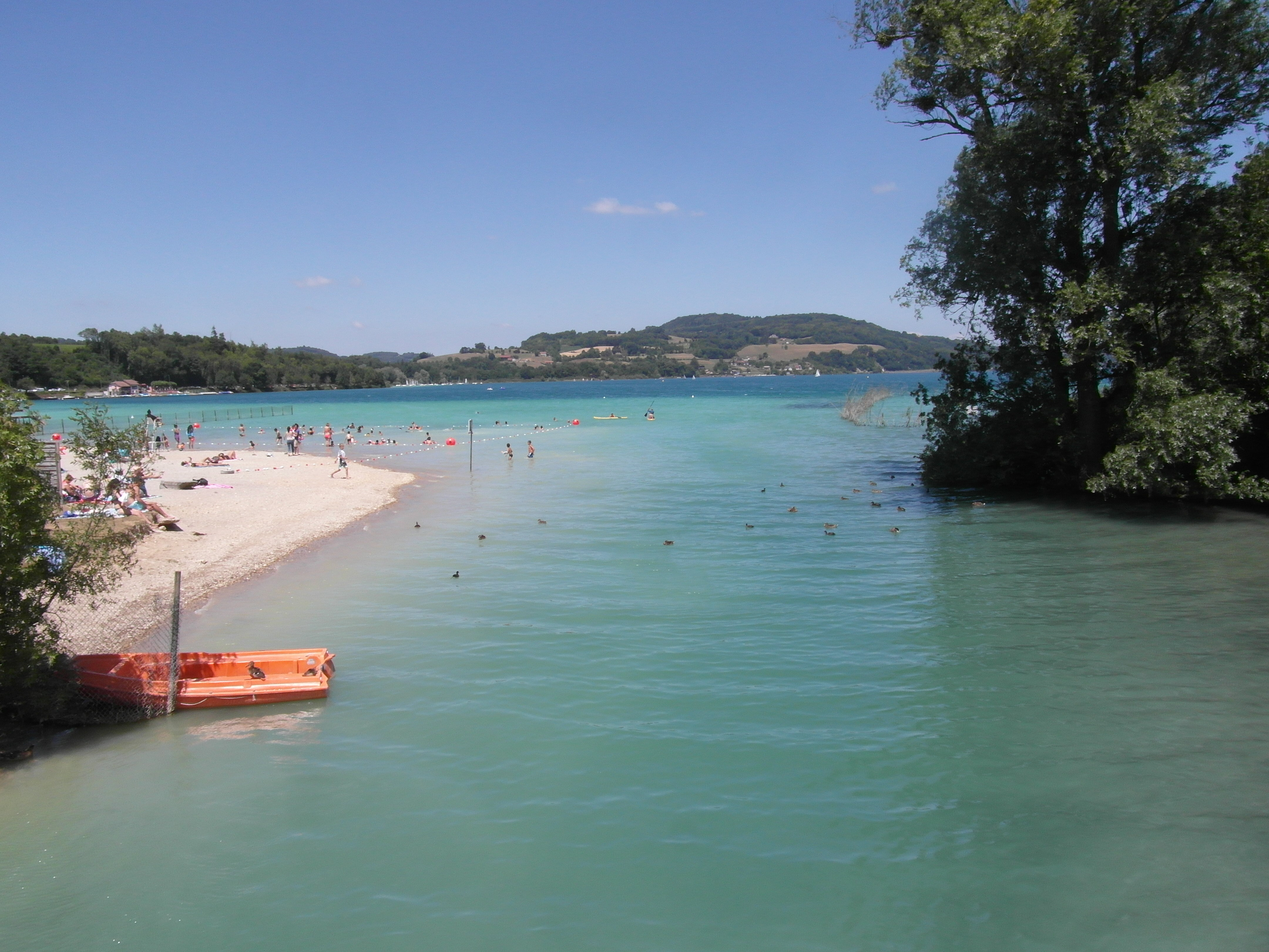 Le lac de Paladru depuis le pont sur la Fure